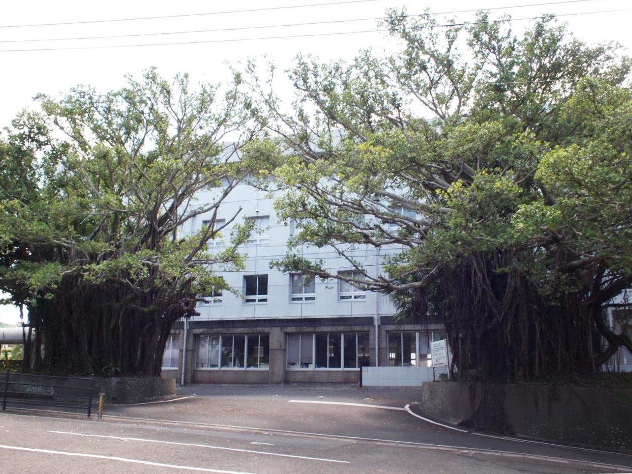 西之表市役所のガジュマル